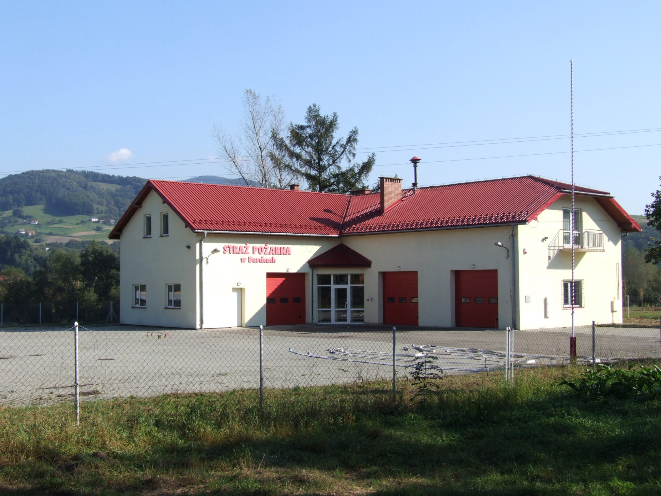 Remiza Straży Pożarnej w Barcicach